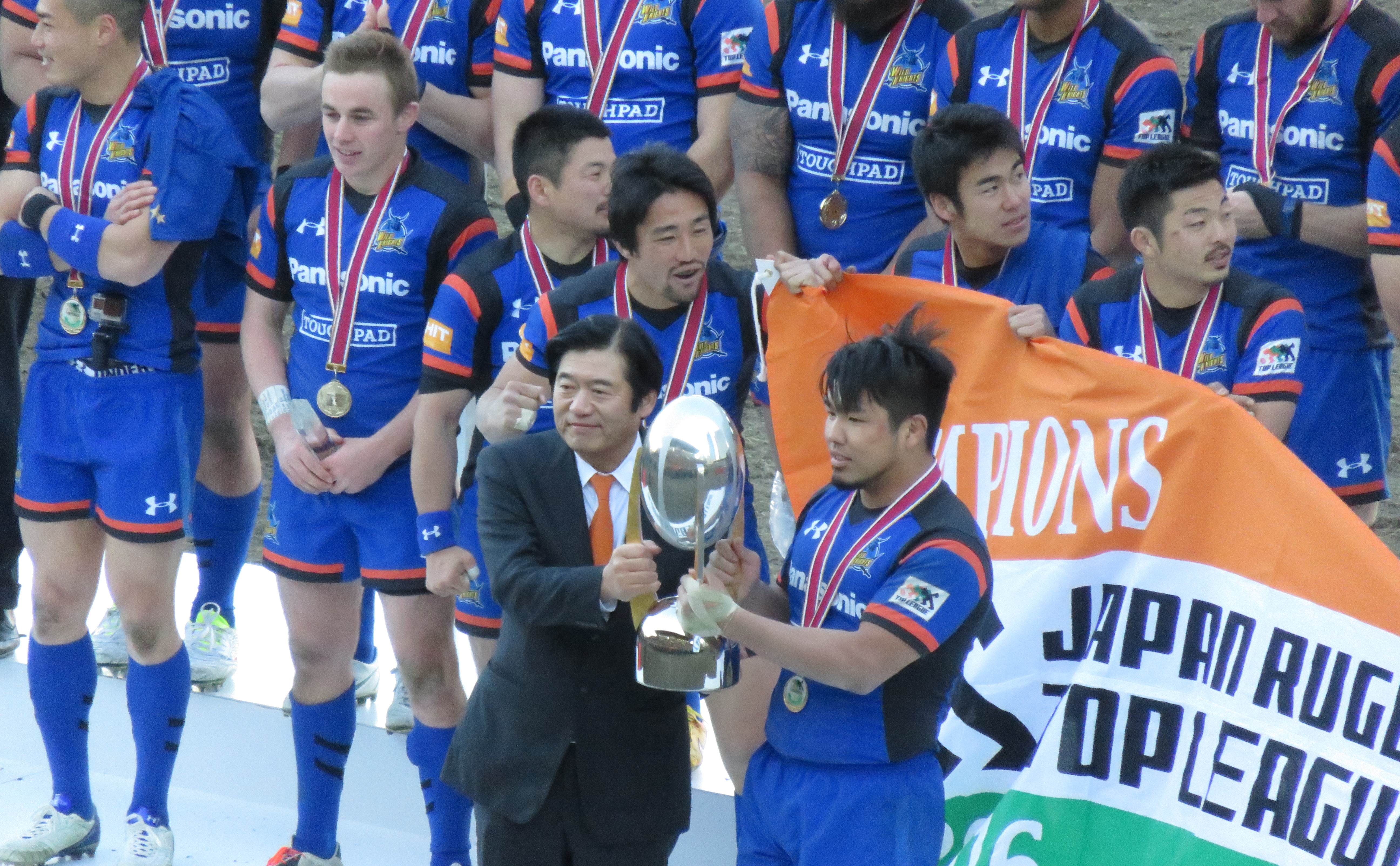 ジャパンラグビートップリーグ2015-2016 優勝したパナソニック ワイルドナイツ